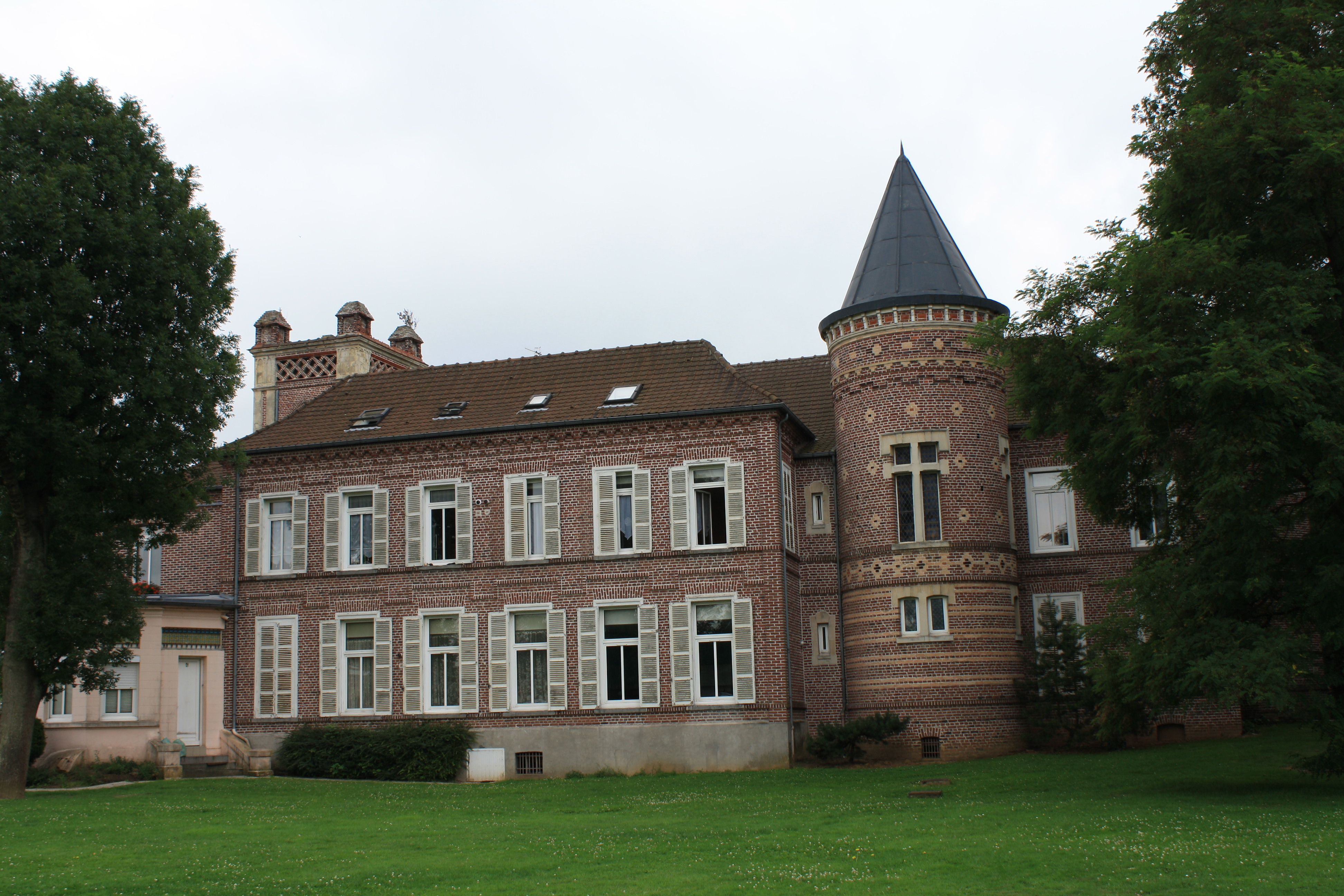 Chateau Blanche Maison de Leforest